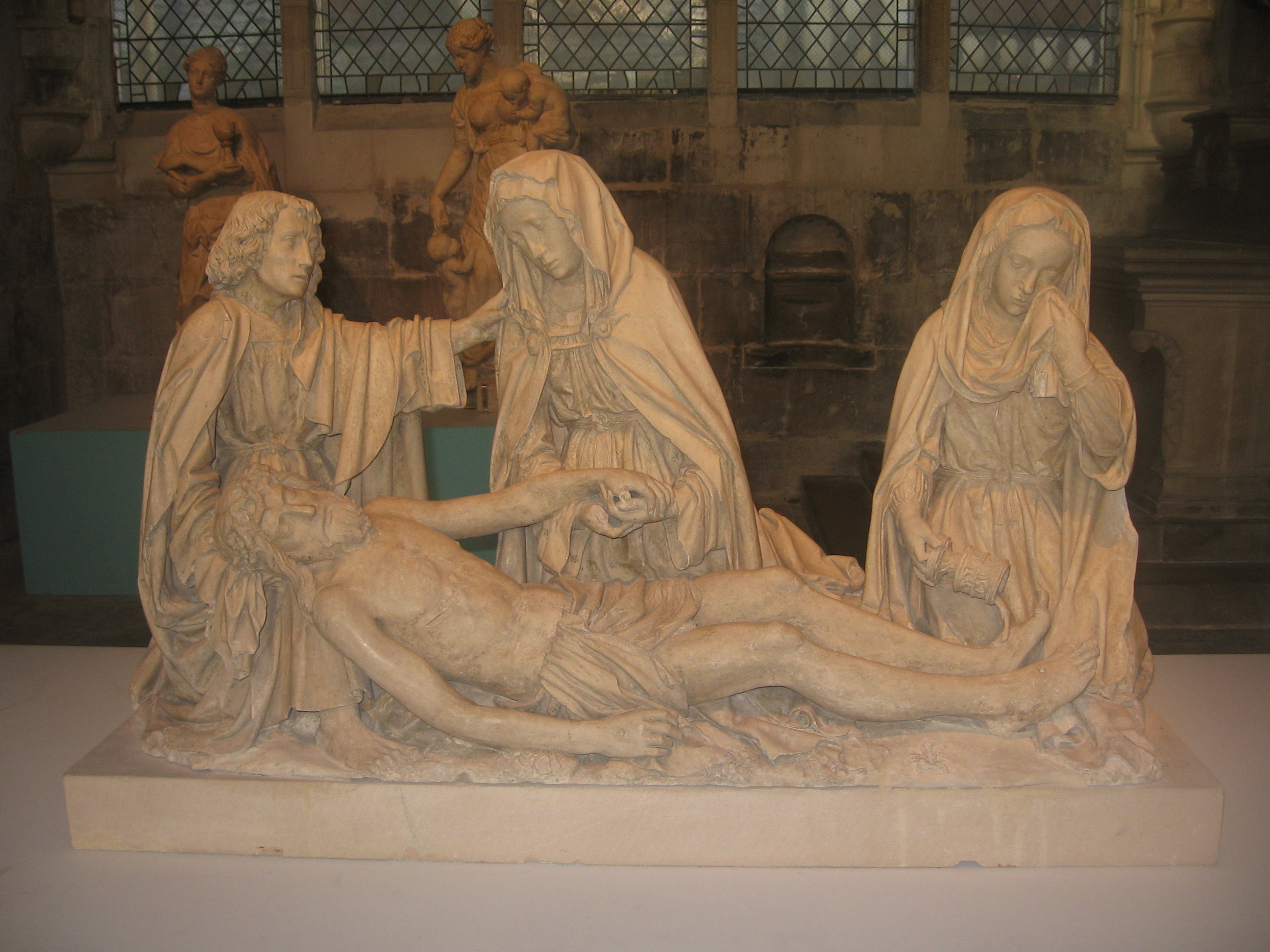 Exposition "Le Beau XVIe siècle". Déploration Maître de Chaource. Vers 1515-1530. Groupe, calcaire, traces de polychromie. Troyes (Aube) Classé Monument historique en 1840